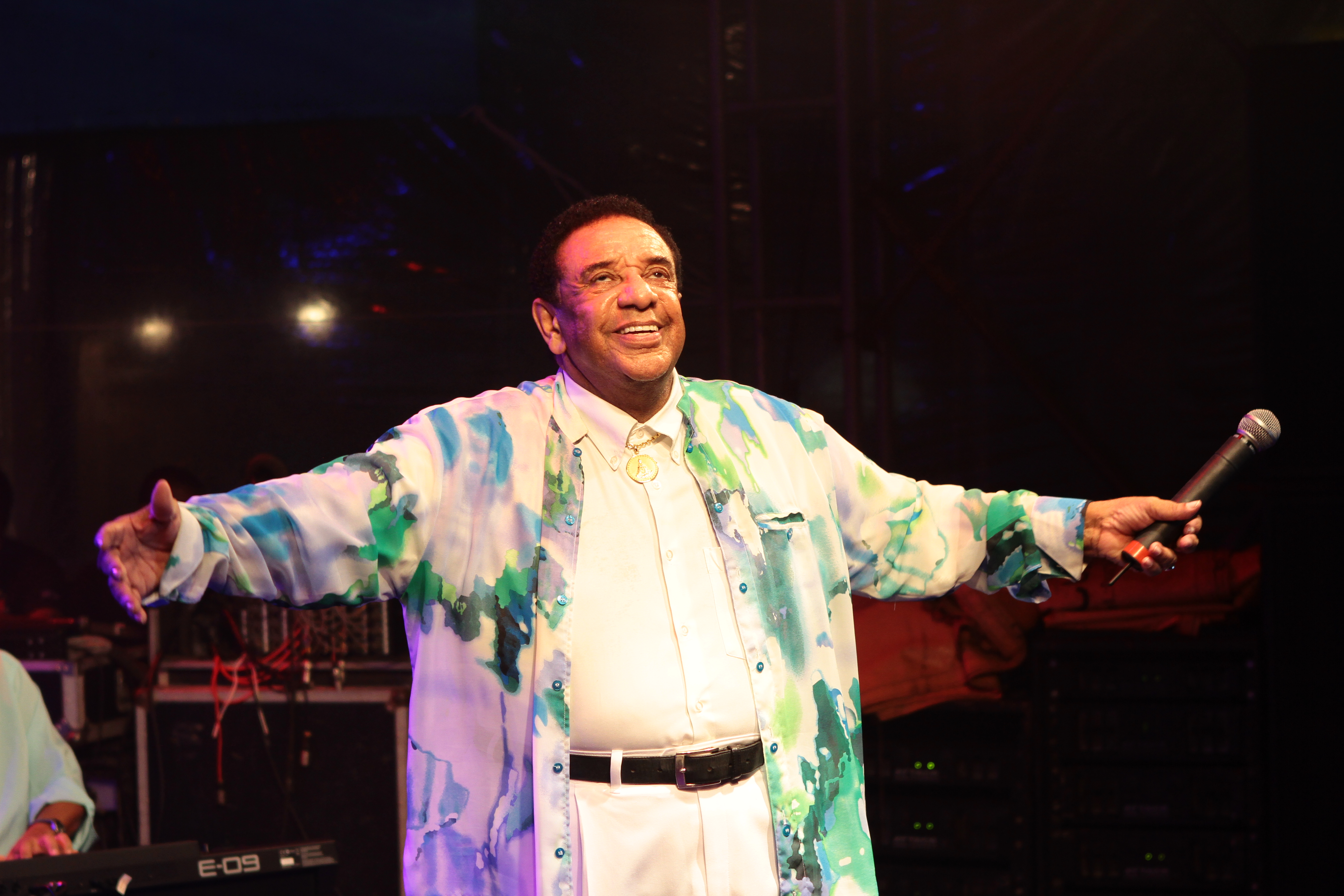 Cantor brasileiro